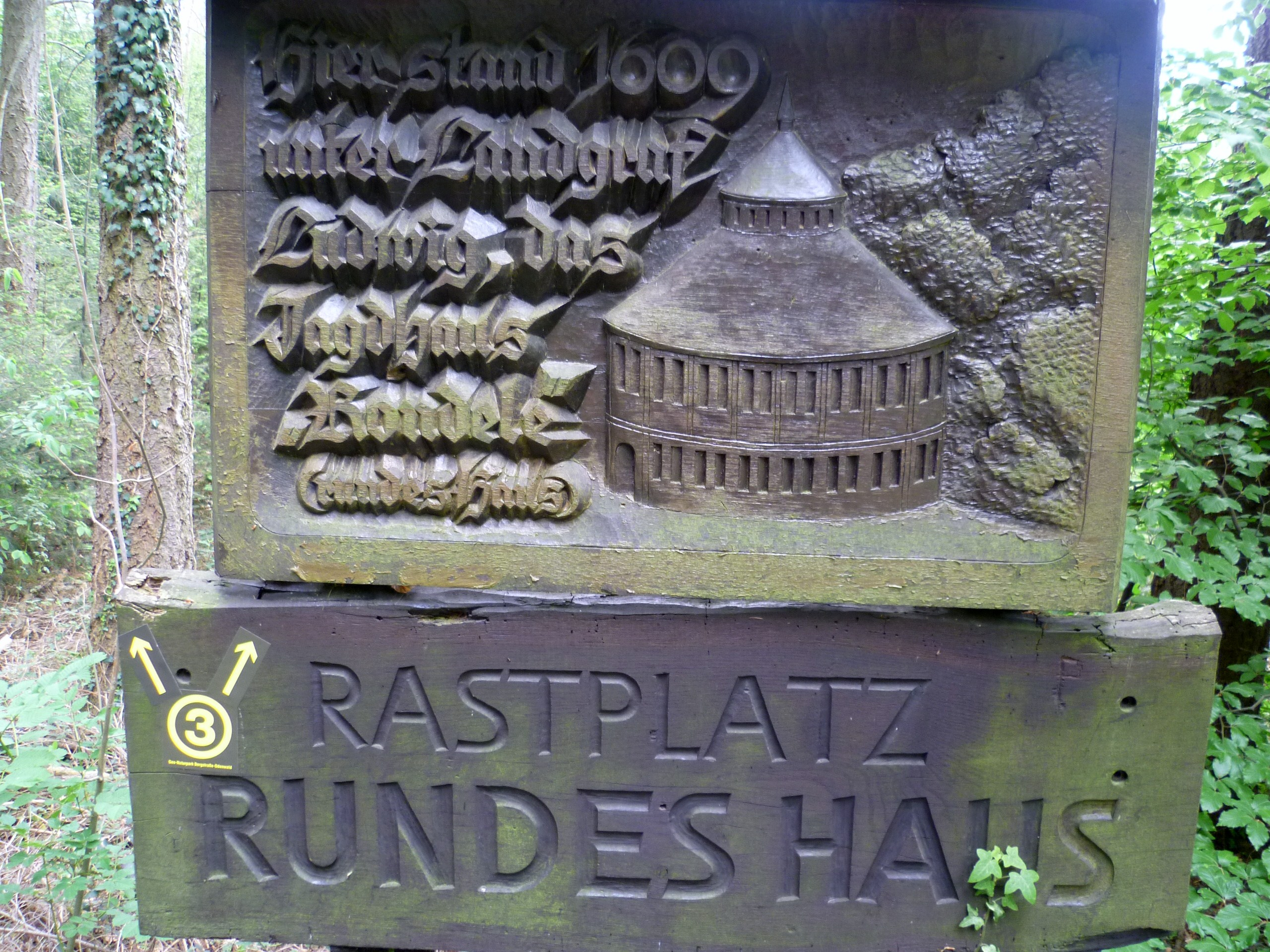 Rastplatz Rundes Haus im Jägersburger Wald bei Einhausen (Hessen). Detailaufnahme der Erinnerungstafel an das ehemals an dieser Stelle befindliche Jagdschloss. Inschrift: Hier stand 1609 unter Landgraf Ludwig das Jagdhaus Rondele (rundes Haus).